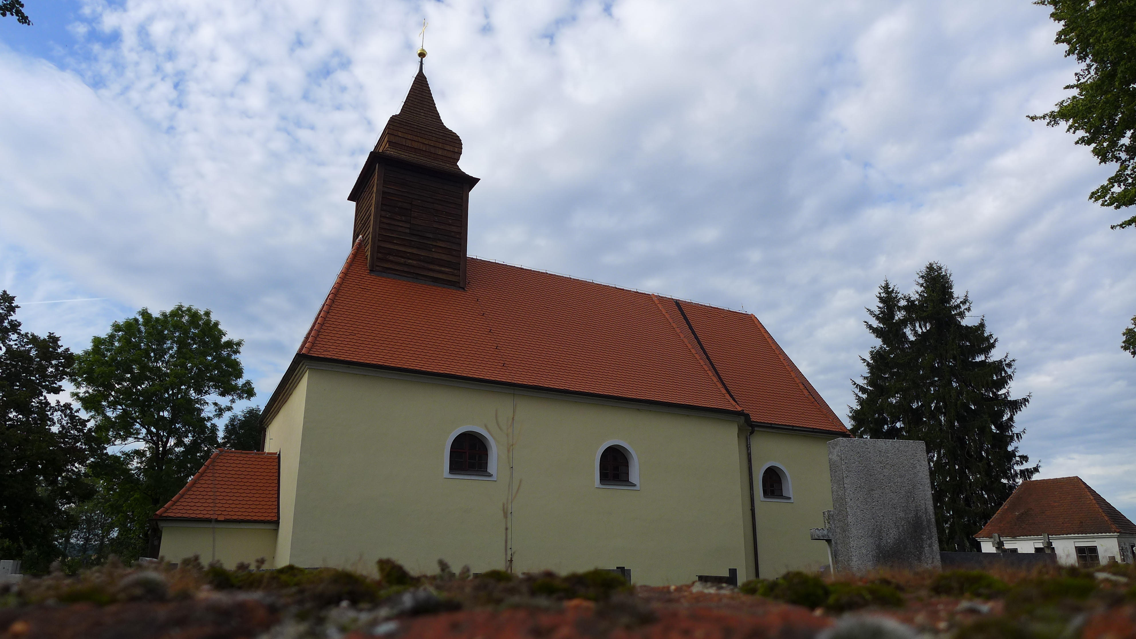 Kostel svatého Jakuba, návrší na jihovýchodním okraji obce, Jakubov u Moravských Budějovic.